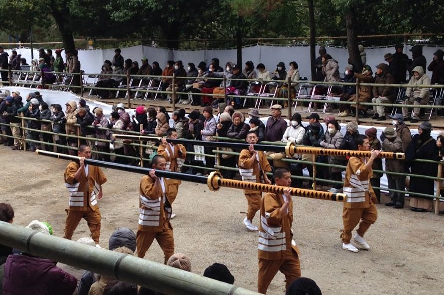 影向の松前を通過する野太刀